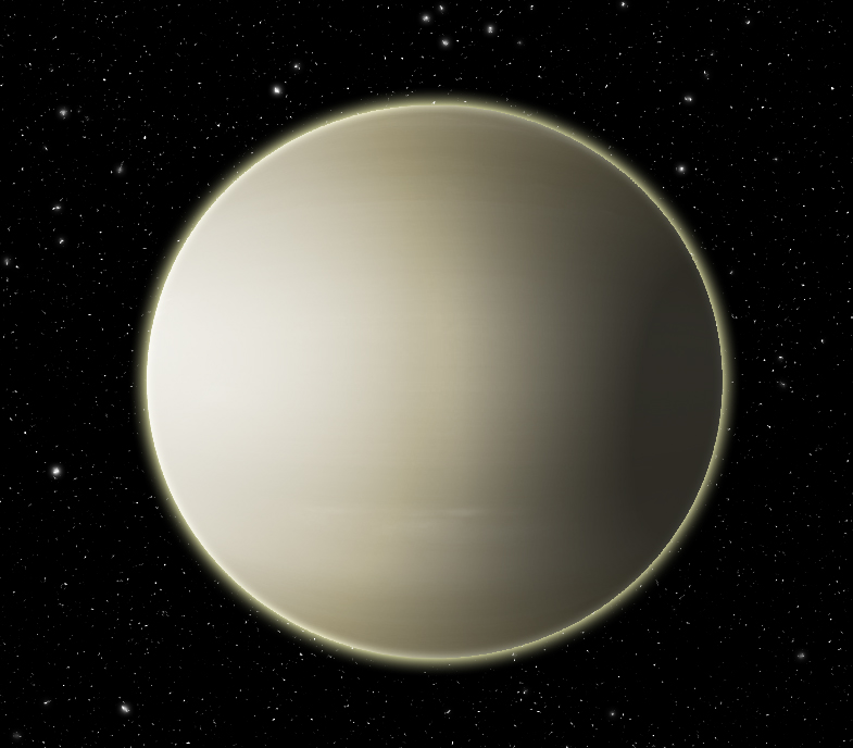 Posible aspecto de Kepler-61b